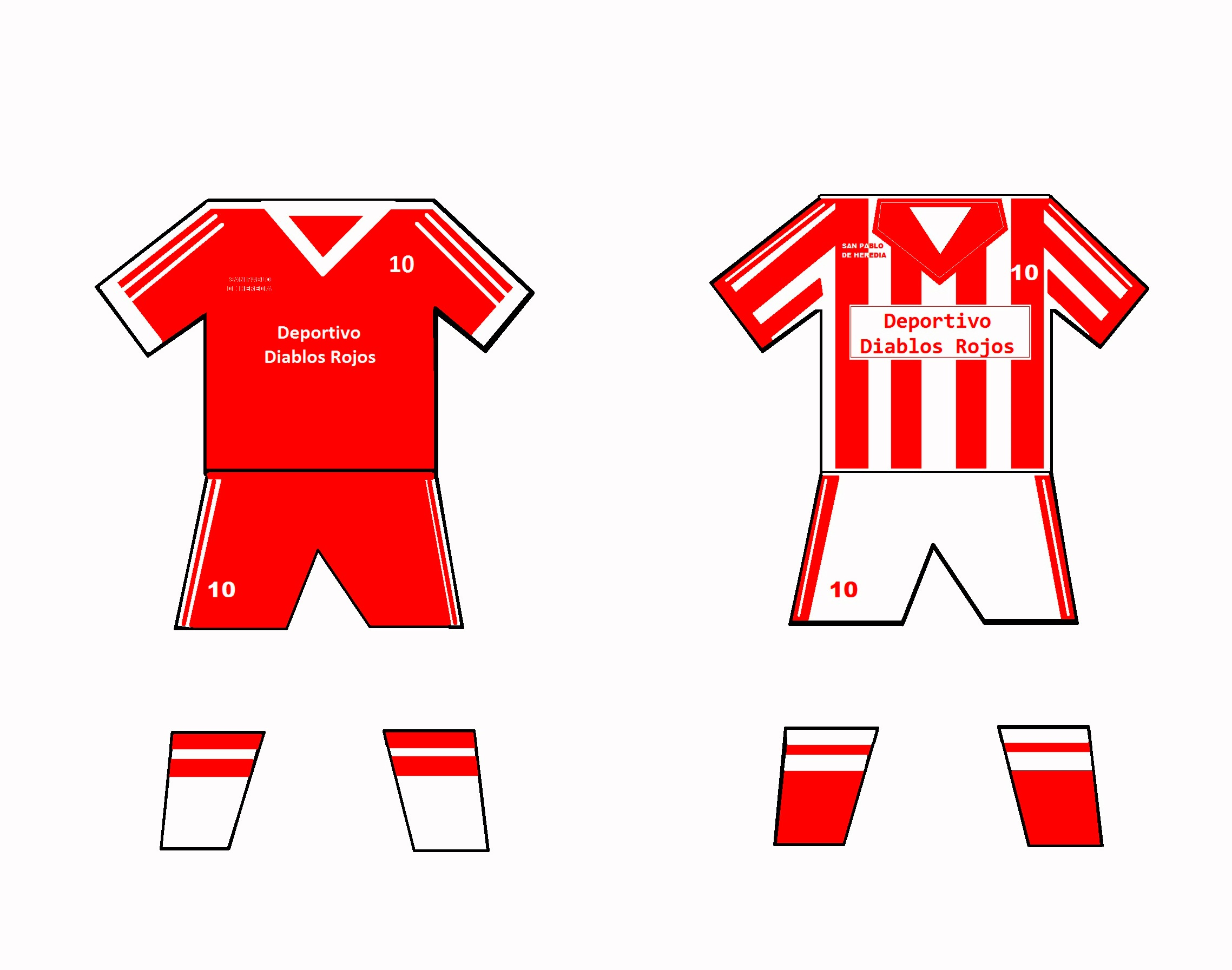 El Deportivo Diablos Rojos fue un club de fútbol del cantón de San Pablo de Heredia fundado en 1979. También conocido como La Primera de San Pablo y jugó en la tercera categoría o Segunda División B del fútbol de Costa Rica. Actualmente cambio su nombre a A.D. Municipal San Pablo; y que juega en LINAFA.